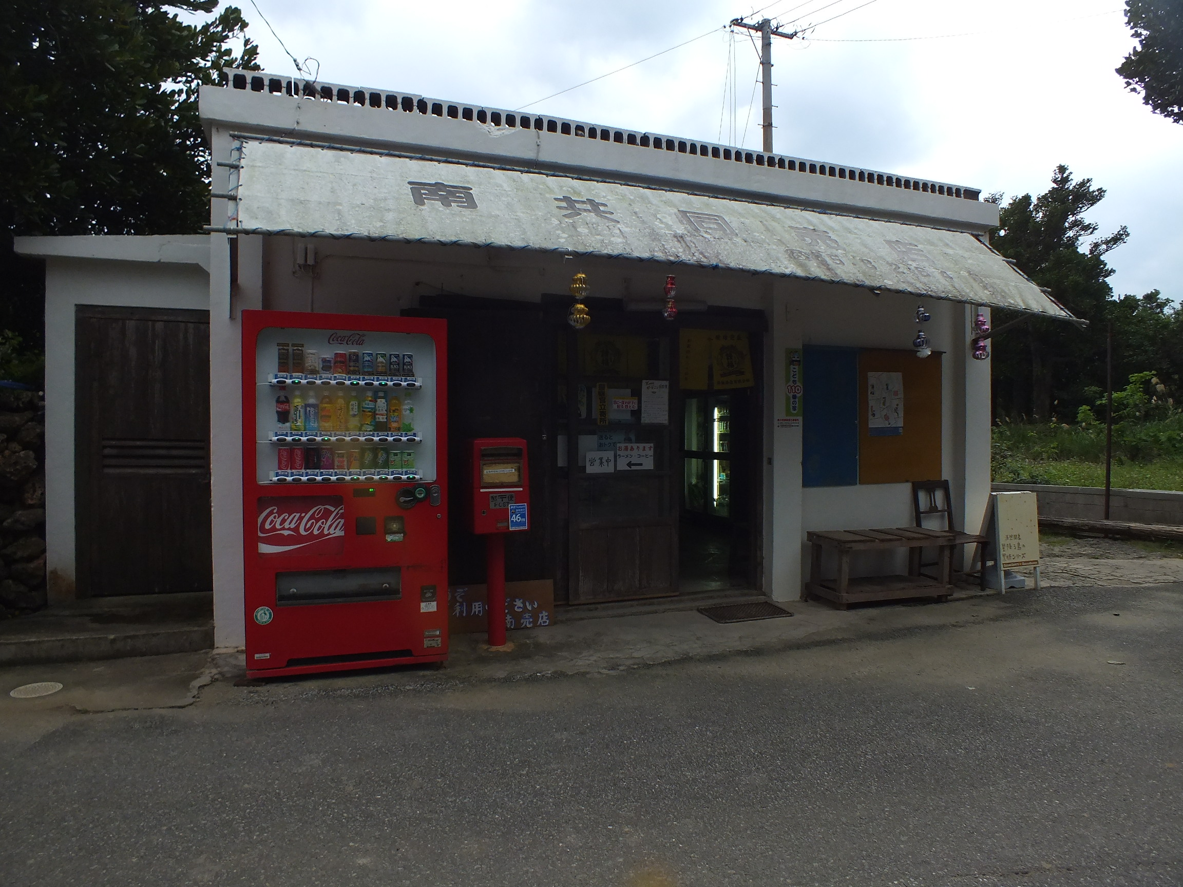 2015-12-17 Minami kyodo Baiten in Haterumajima 南共同売店